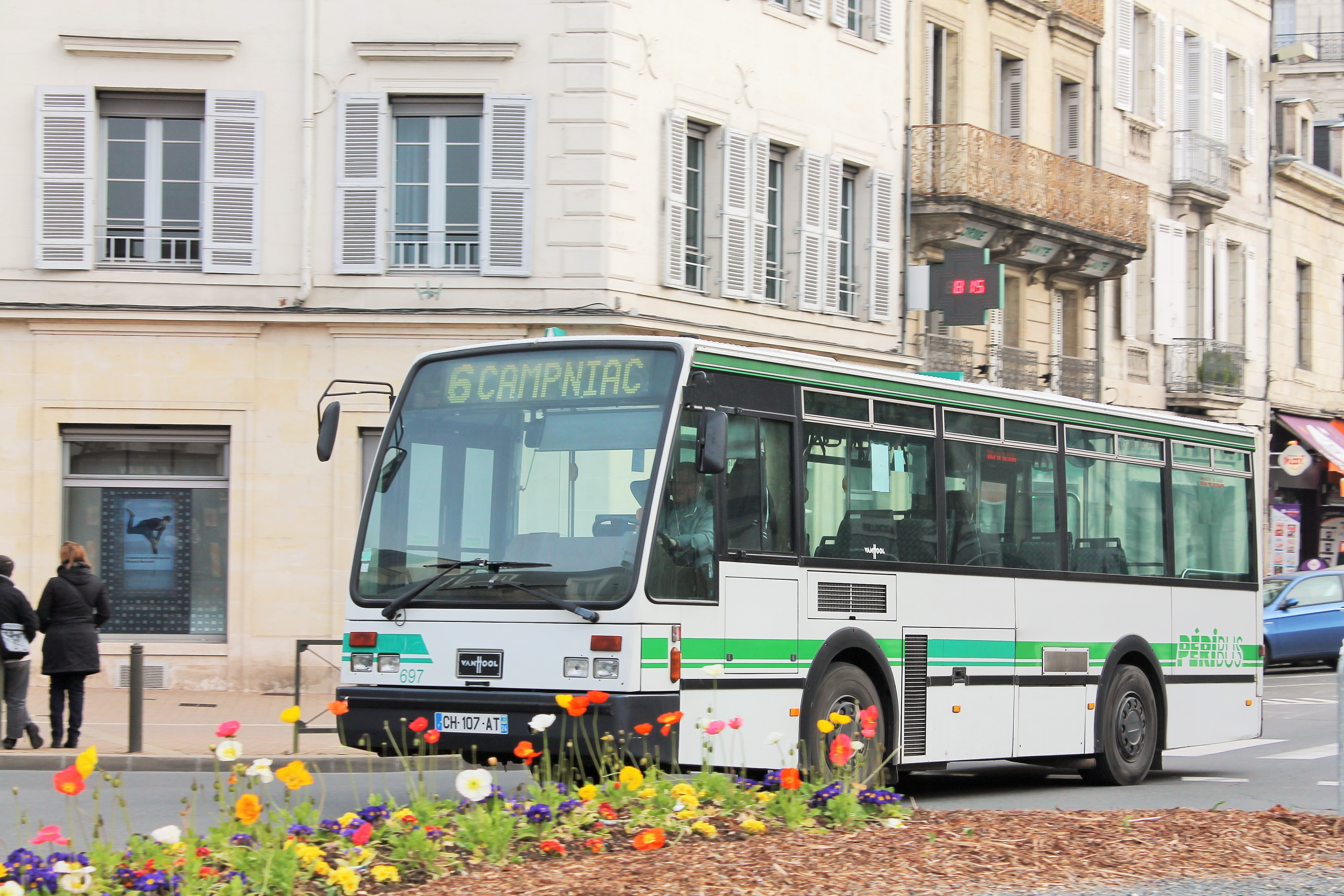 Autobus